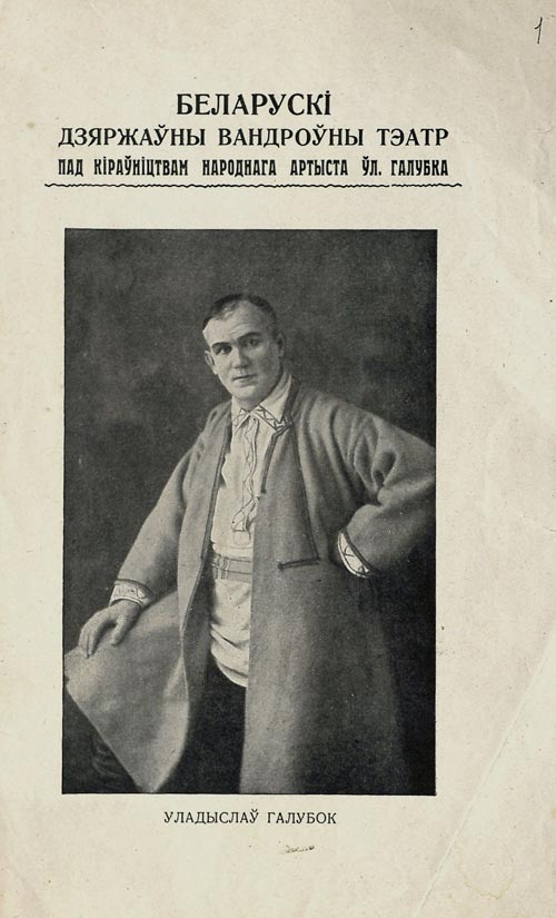 Уладыслаў Галубок